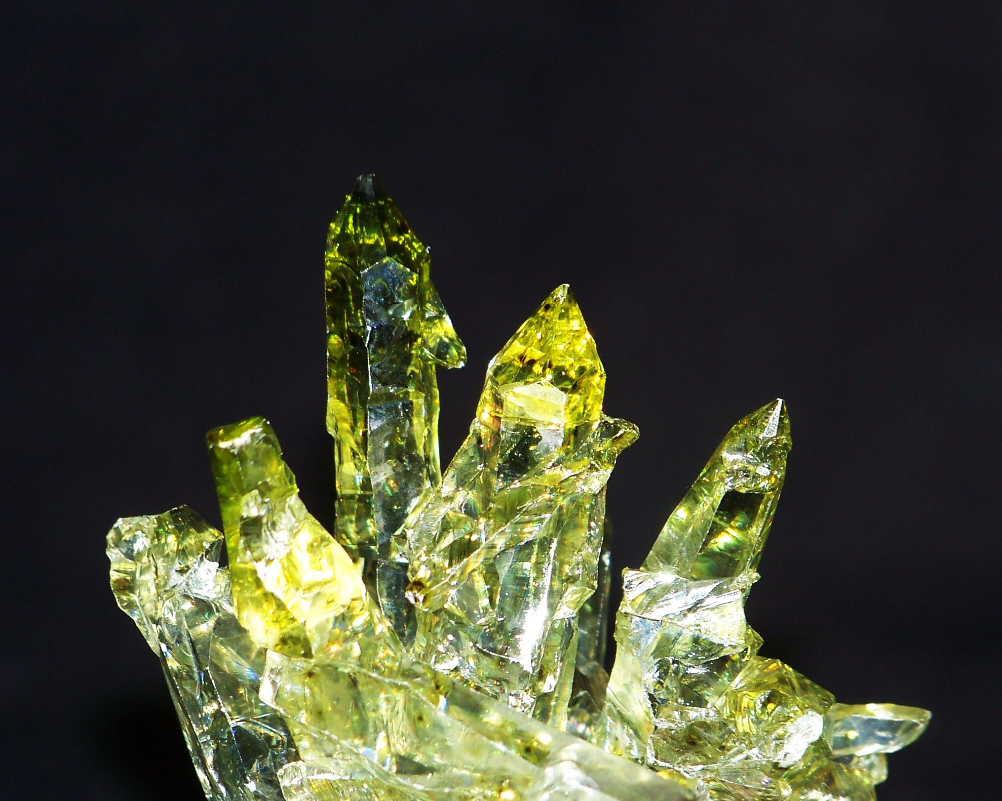 Kryształki cynkitu